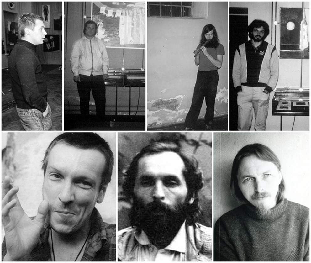 На фотографиях, сделанных в конце 80-х, художники основатели группы "Крепость": В верхнем ряду - Герман Петровых, Василий Коломийцев, Алексей Тараканов, Олег Погасий. В нижнем ряду - Сергей Потапенко, Владимир Заклинский, Сергей Молотков.